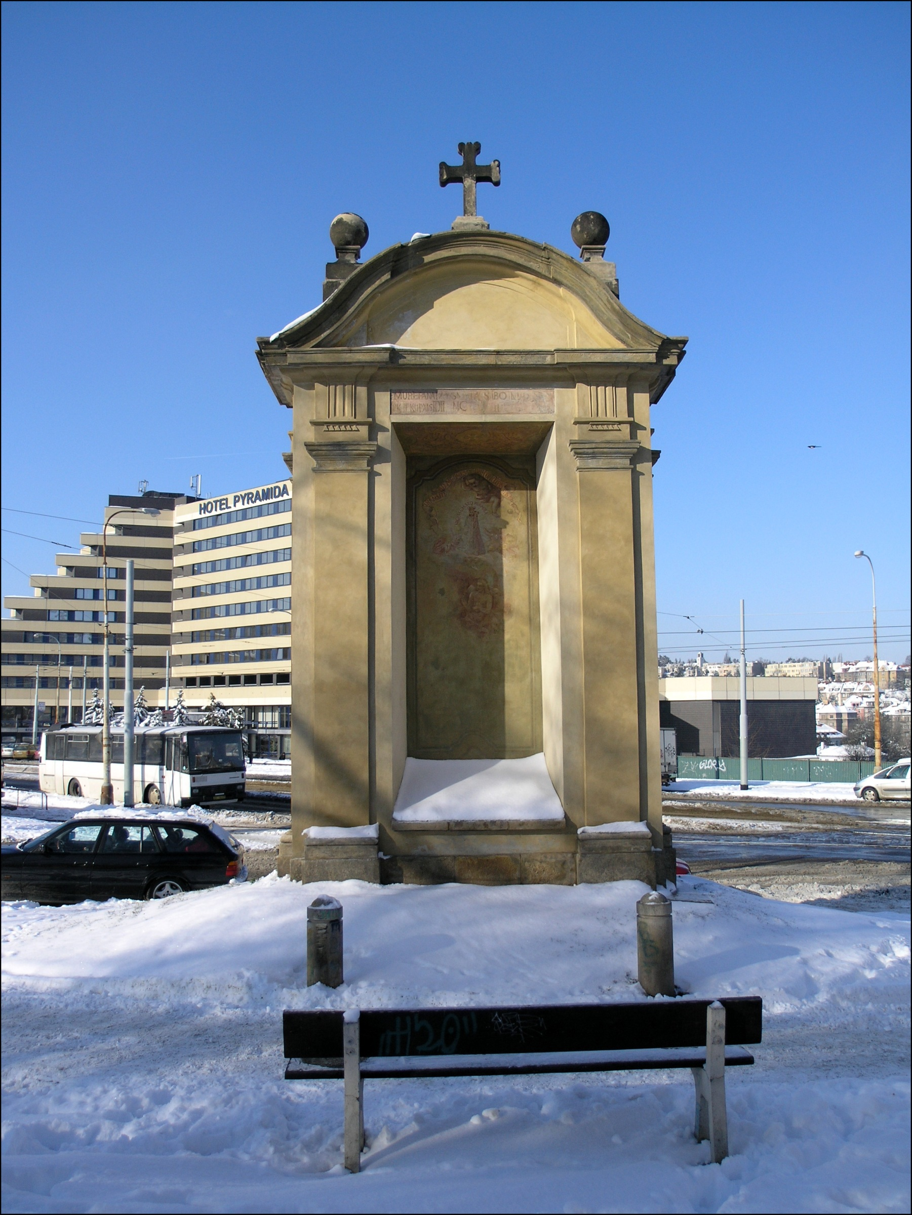 Praha, Břevnov - ulice Gymnastická, výklenková kaple na poutní cestě z pražské Lorety do kláštera v Hájku / v pozadí hotel Pyramida